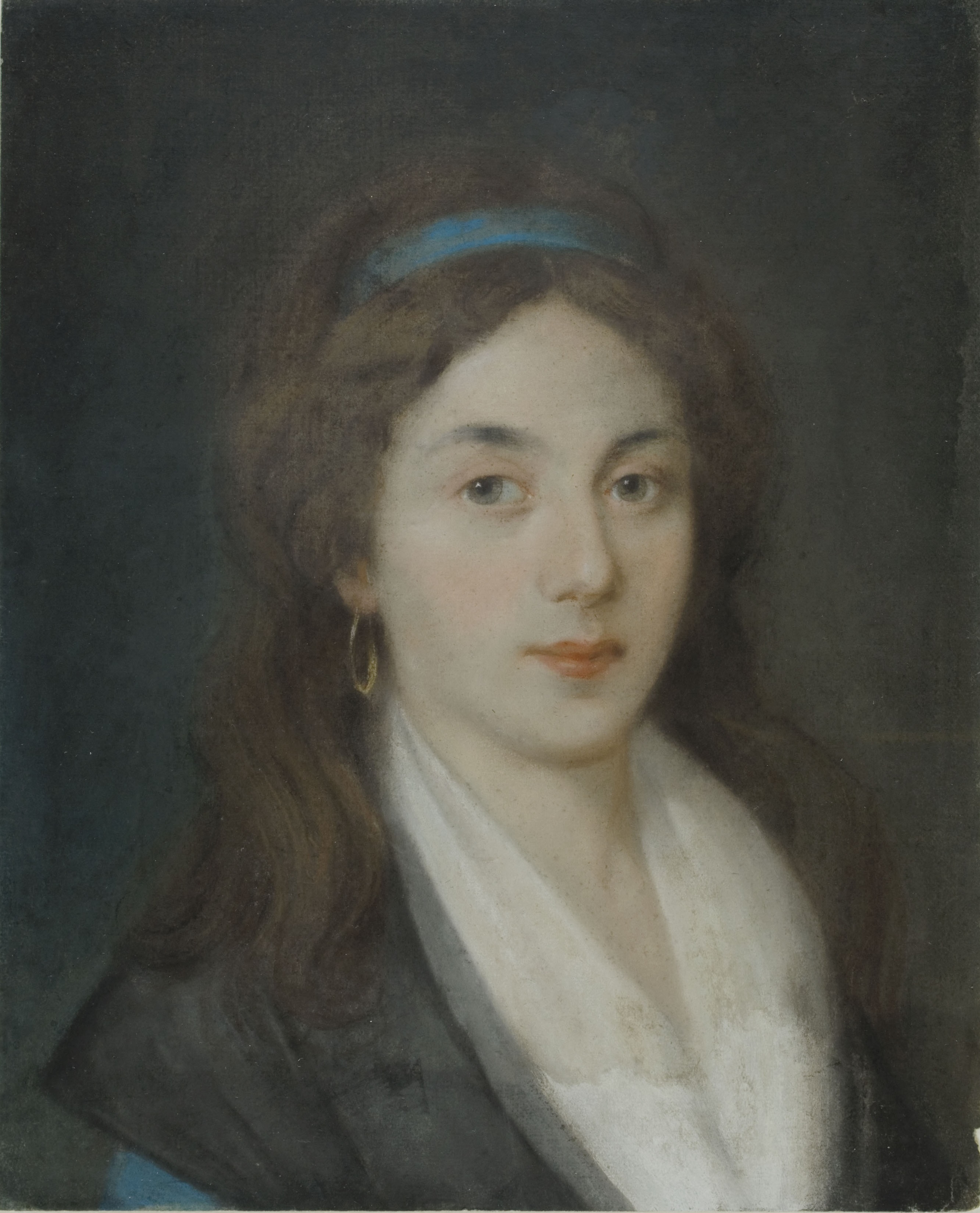 Portrait présumé d'Éléonore Duplay (1768-1832).